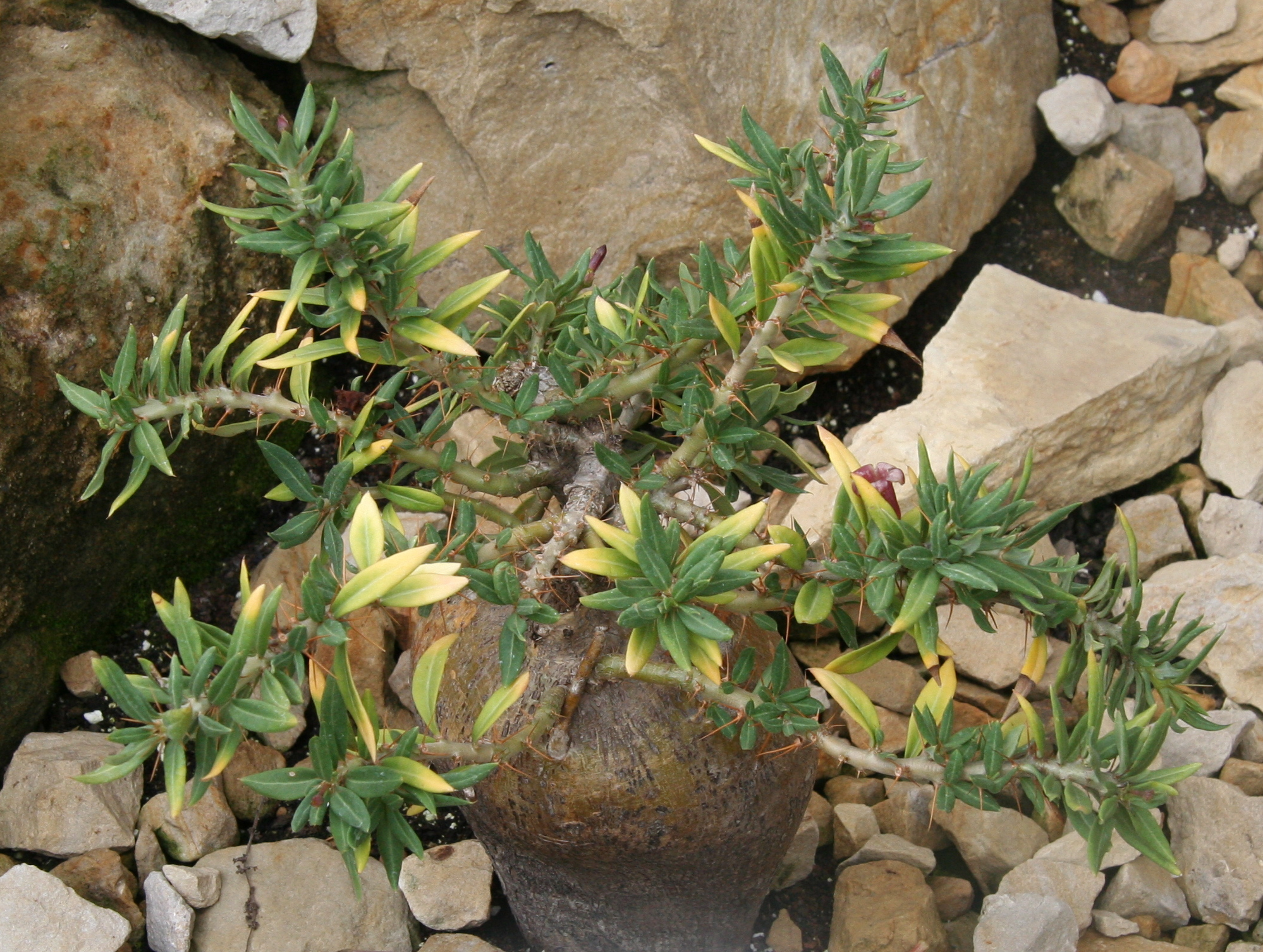 Pachypodium bispinosum im Alten Botanischen Garten Hamburg